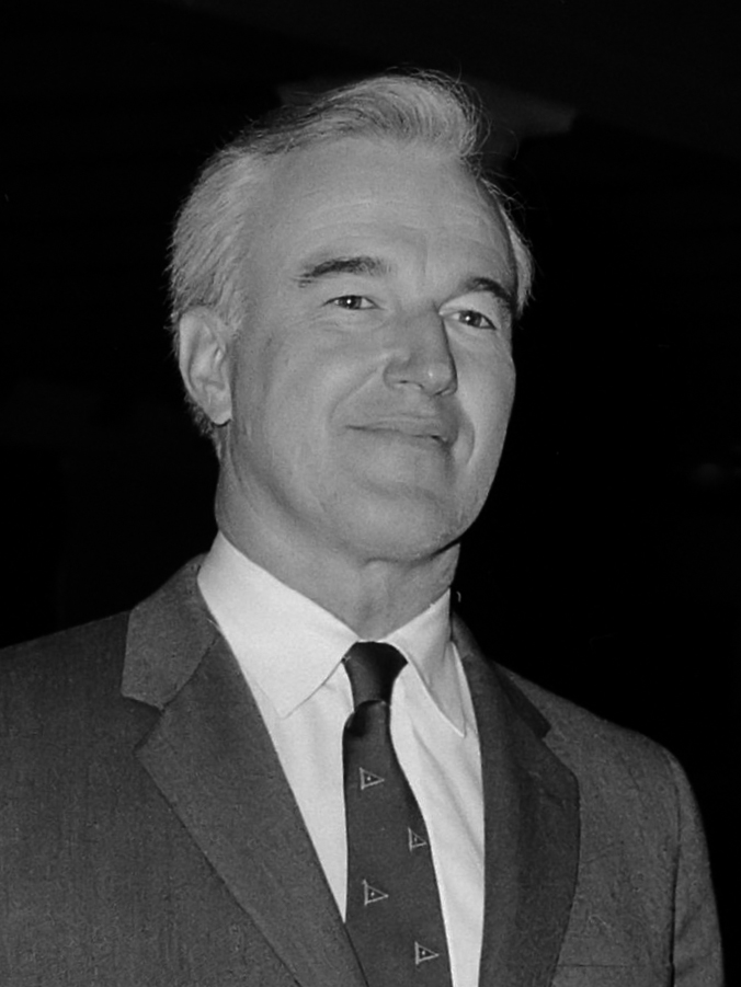 175 Jarig bestaan van het Genootschap ter bevordering van natuur-, genees- en heelkunde. Drie medailles uitgereikt aan v.l.n.r. professor doctor Britton , professor doctor J.D. van der Waals en doctor Willem H. Brummelkamp 24 november 1965